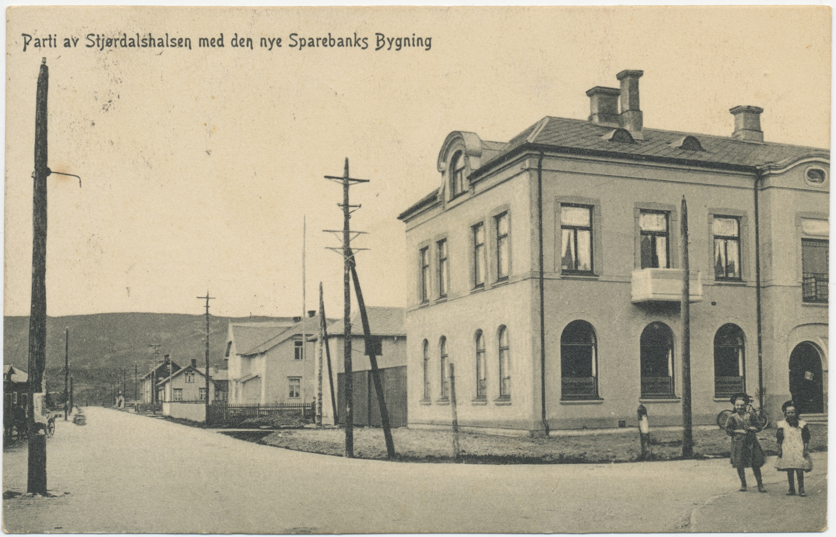 Krysset mellom Innherredsveien (venstre) og Kjøpmannsgata (høyre) på Stjørdalshalsen (Stjørdal). Bygningen til høyre er sparebankens nybygg. Bildet er tatt senest i 1918. Fotograf / Photographer: A.O.M. Iversen (bare enerett til postkort, ikke fotograf?) Fotoeier / Photo owner: Johannes Naavik Digitalisering / Digitizing: Arne Langås (2009) Foto-ID / Photo ID: 043-0569 Hvis bildet gjengis i andre sammenhenger, oppgi Åsen Museum og Historielag, fotoeier og fotograf som kildereferanse. Har du utfyllende opplysninger? Legg gjerne igjen en kommentar nedenfor eller send e-post til . | If you re-use this photo, please refer to Åsen Museum og Historielag, the photographer and the owner of the photo. Do you have additional information? Please leave a comment or send an e-mail to .